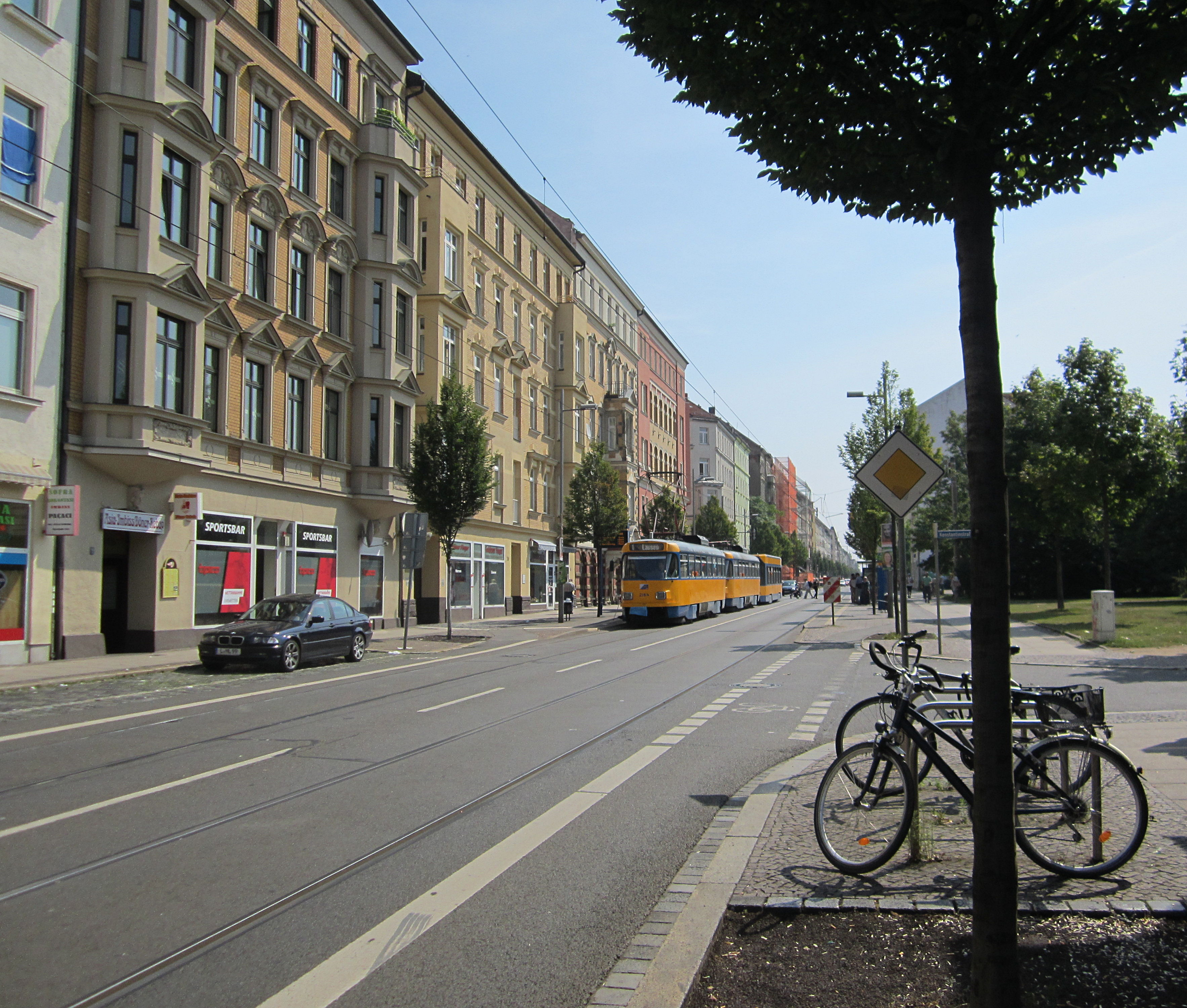 Haltestelle Einertstraße in der Eisenbahnstraße; rechts Otto-Runki-Platz